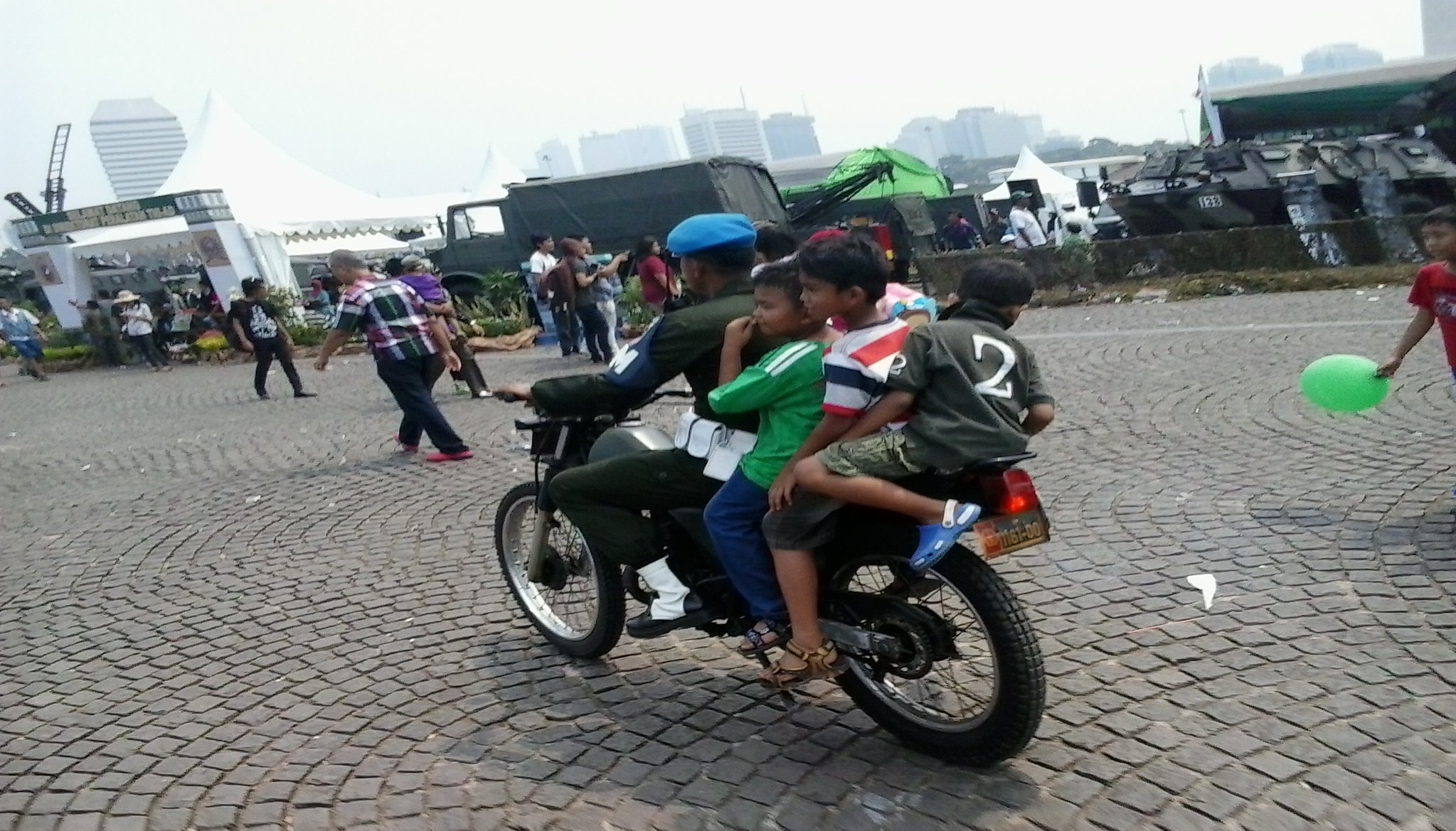 Seorang anggota Polisi Militer TNI AD memboncengi sejumlah anak-anak dengan sepeda motor pada acara pameran alutsista TNI AD.